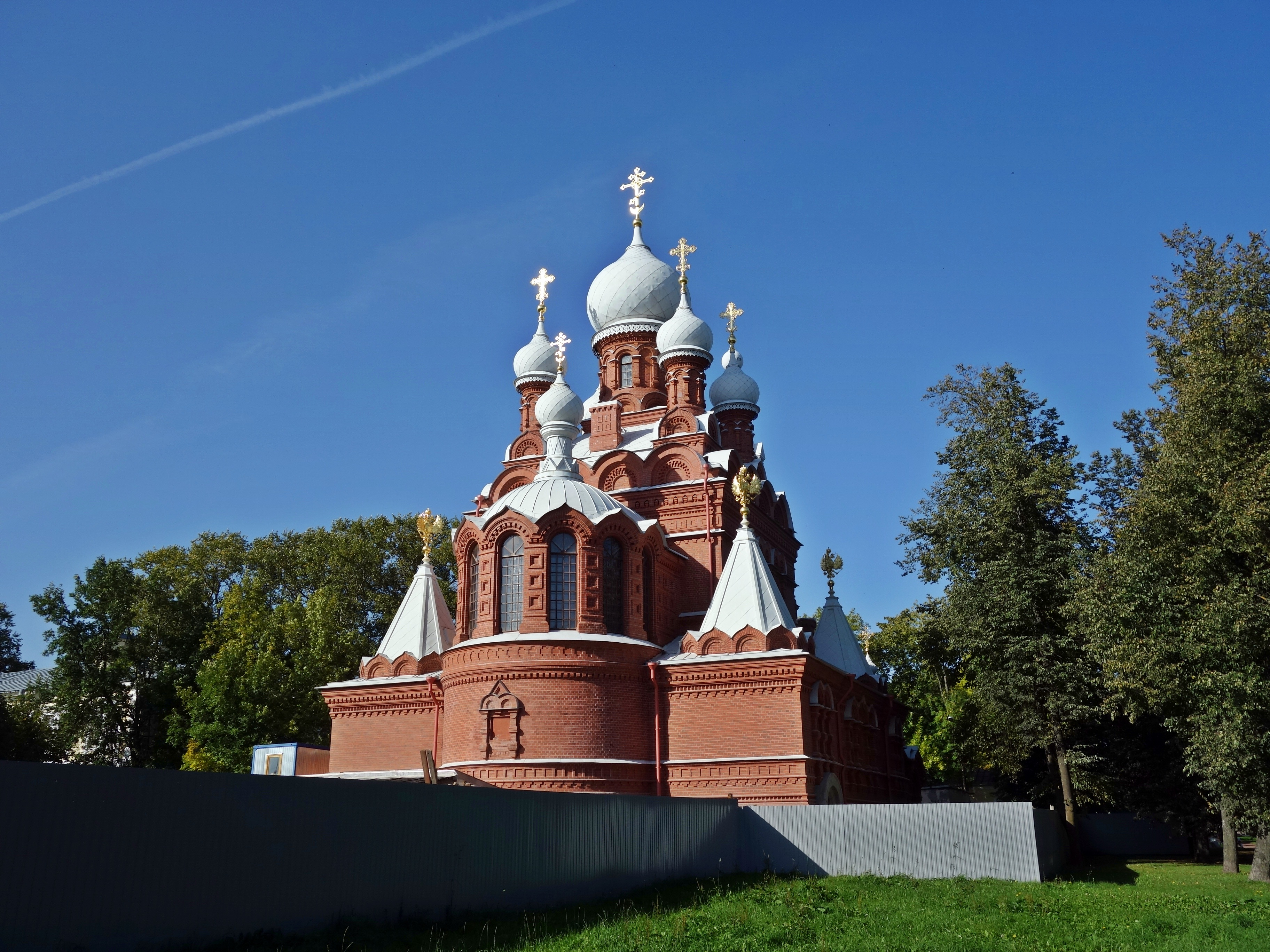 Церковь мученика Иулиана Тарсийского: Кадетский бульвар, 7, Пушкин, Пушкинский район, Санкт-Петербург